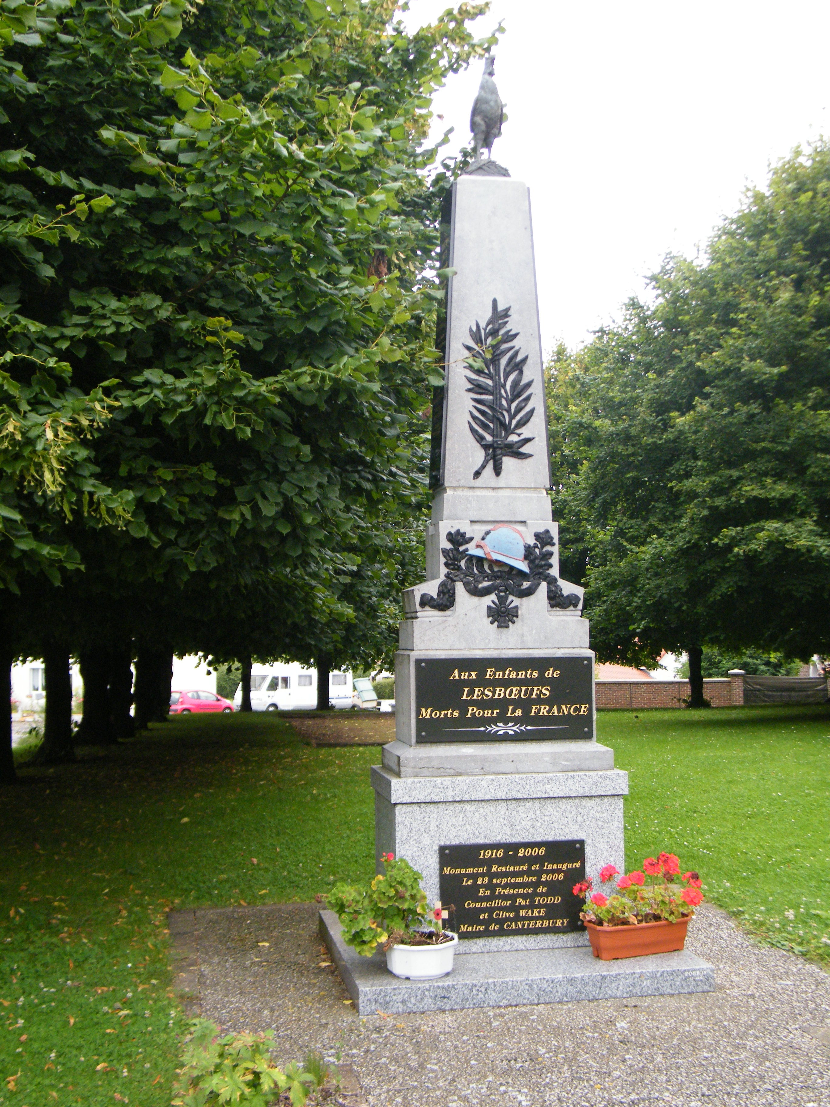 Monument aux morts pour la France.